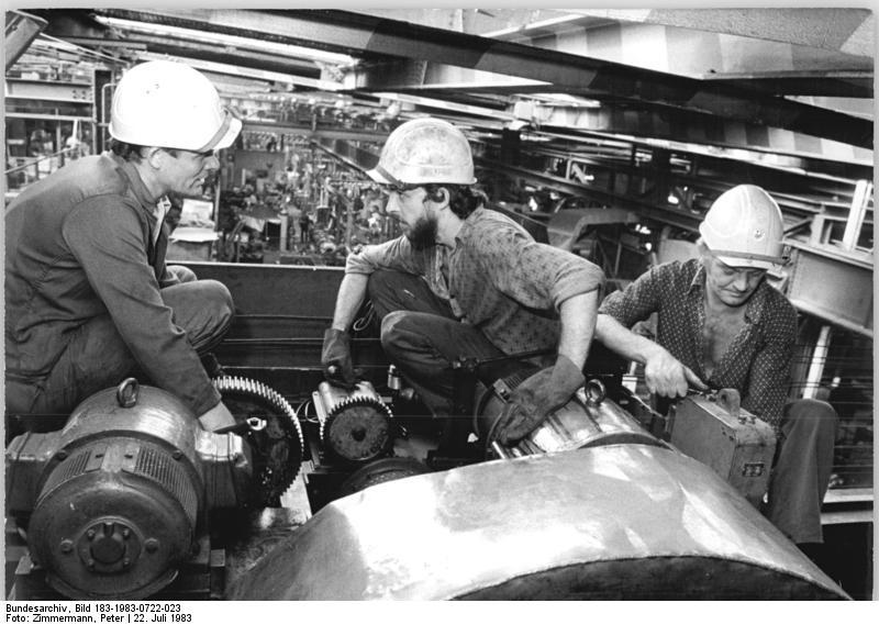 Berlin, Für die Instandhaltung und Reparatur ADN-ZB Zimmermann 22.7.1983 Berlin: Für die Instandhaltung und Reparatur der betrieblichen Transportmittel im RAW "Roman Chwalek", Berlin-Schöneweide, sind die 24 Mitglieder des Kollektivs "Julius Fucik" aus der Technischen Abteilung verantwortlich. Innerhalb des Rationalisierungsmittelbaus wollen sie in diesem Jahr einen Industrieroboter für den Transport der S-Bahnwagen in der Lackierung fertigen. Wolfgang Dörwand, Olaf Richter und Wolfgang Freiert (v.l.) überholen eine Laufkatze eines 5-Tonnen-Kranes. Für den Solidaritätsbasar des Betriebes fertigen die Brigademitglieder verschiedene Gegenstände, so Kerzenhalter aus Metall.